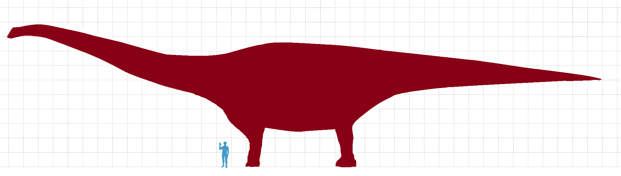 Comparación entre el tamaño de un hombre adulto promedio y un ejemplar de la especie de Titanosauria exhumada, por investigadores del Museo Paleontológico Egidio Feruglio (MEF) de Trelew, en el paraje El Sombrero, provincia del Chubut, en la Patagonia argentina, y dada a conocer en mayo de 2014. Cada cuadrado representa 1 metro de lado. La forma del titanosaurio es esquemática.